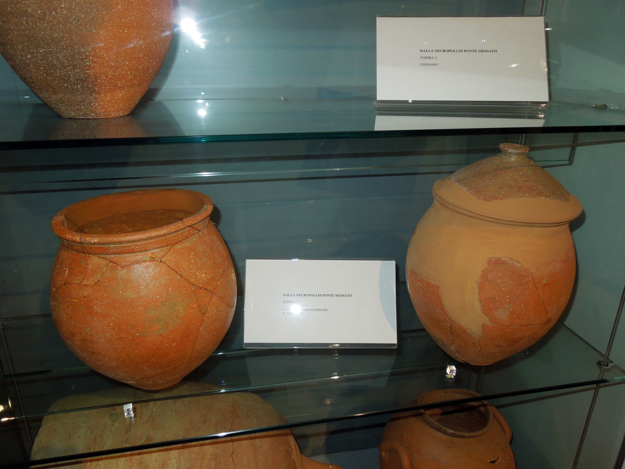 Olle cinerarie provenienti dalla necropoli di Ponte Messato in Teramo, custodite presso il Civico museo archeologico Francesco Savini.